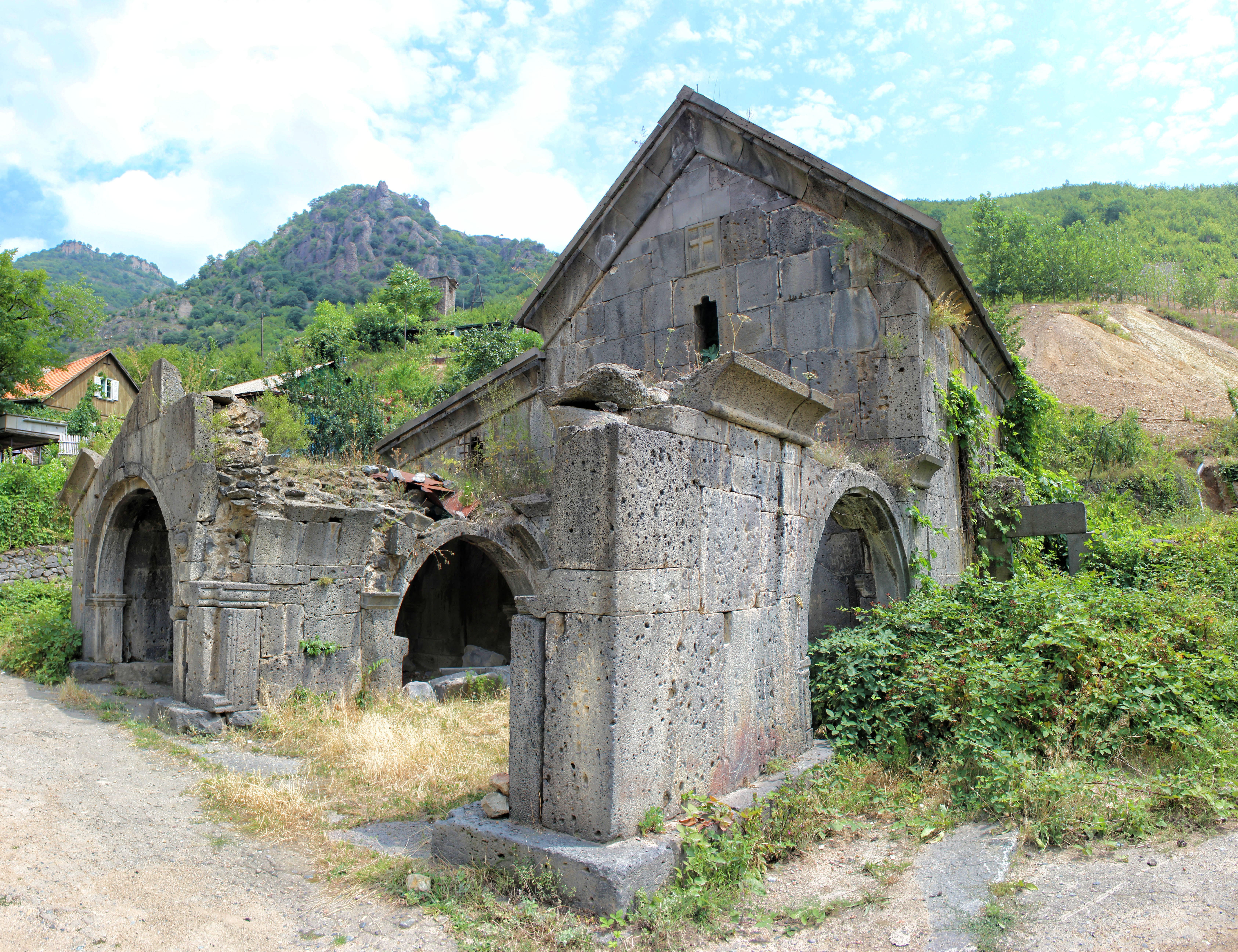 Ախթալայի Վանական համալիր Սբ. Երրորդություն 13 դար, գյուղի կենտրոնական մասում, Ախթալայի վանքից 0.5 կմ հյուսիս-արևելք 5.1/14